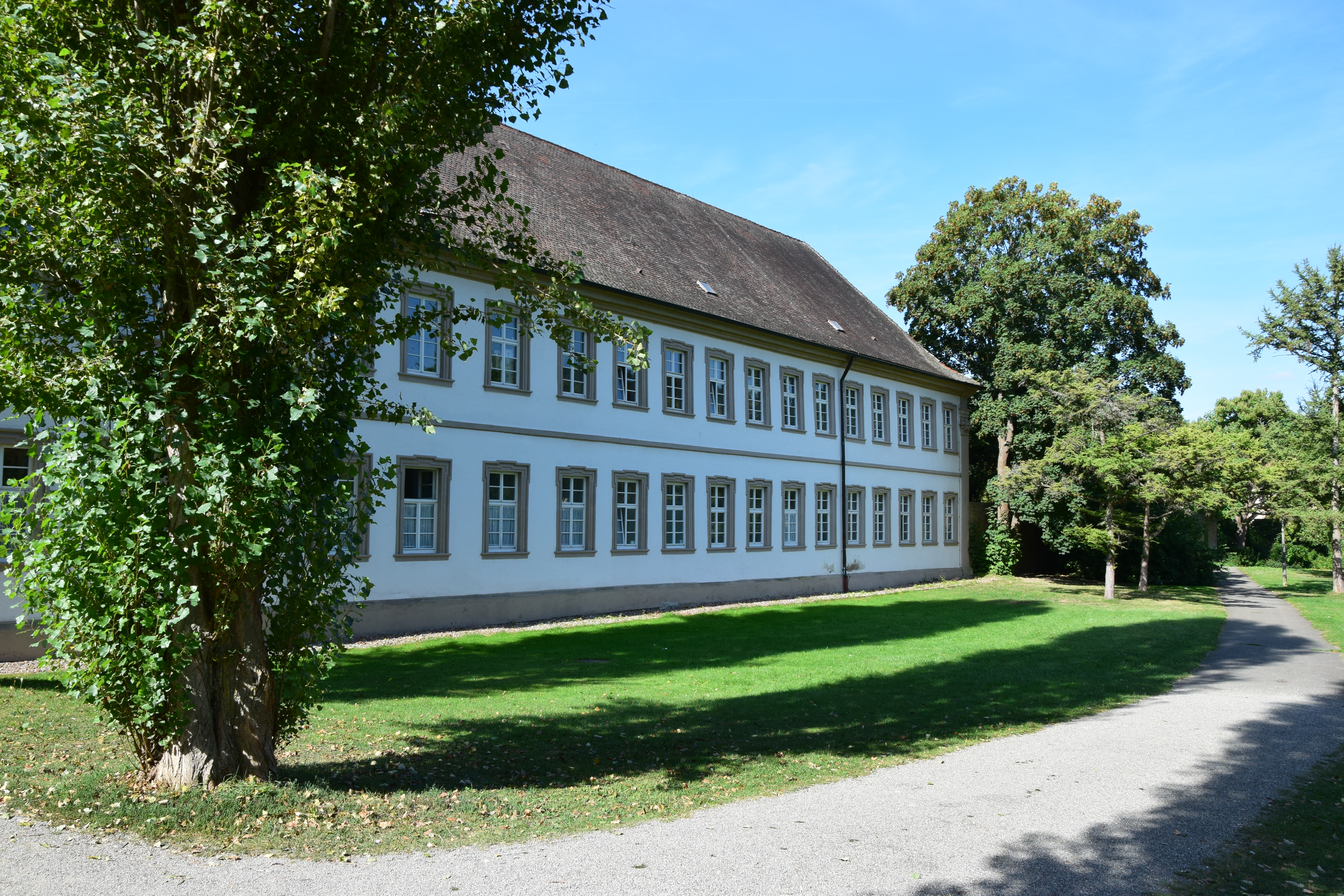 Gebäude des Deutschordensschlosses in Bad Mergentheim im Main-Tauber-Kreis, Deutschland. Heute als Amtsgericht genutzt.